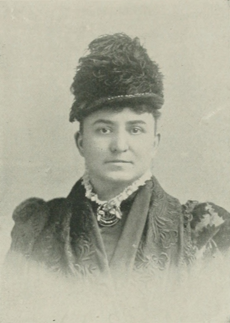 portrait from